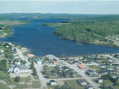 Village de Sainte-Anne-du-Lac, QC